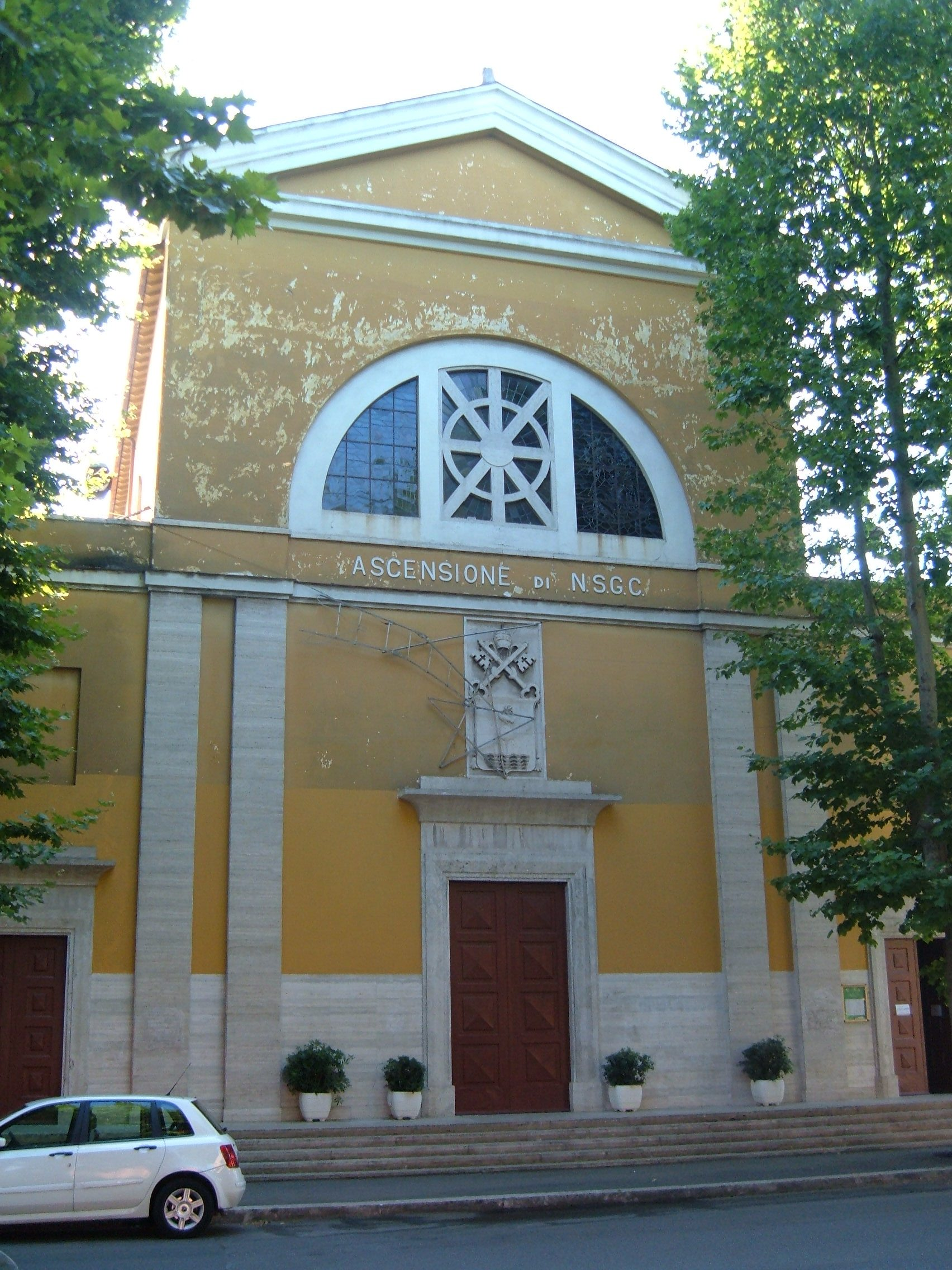 Chiesa dell'Ascensione di Nostro Signore Gesù Cristo nel quartiere Alessandrino (Quarticciolo) a Roma.